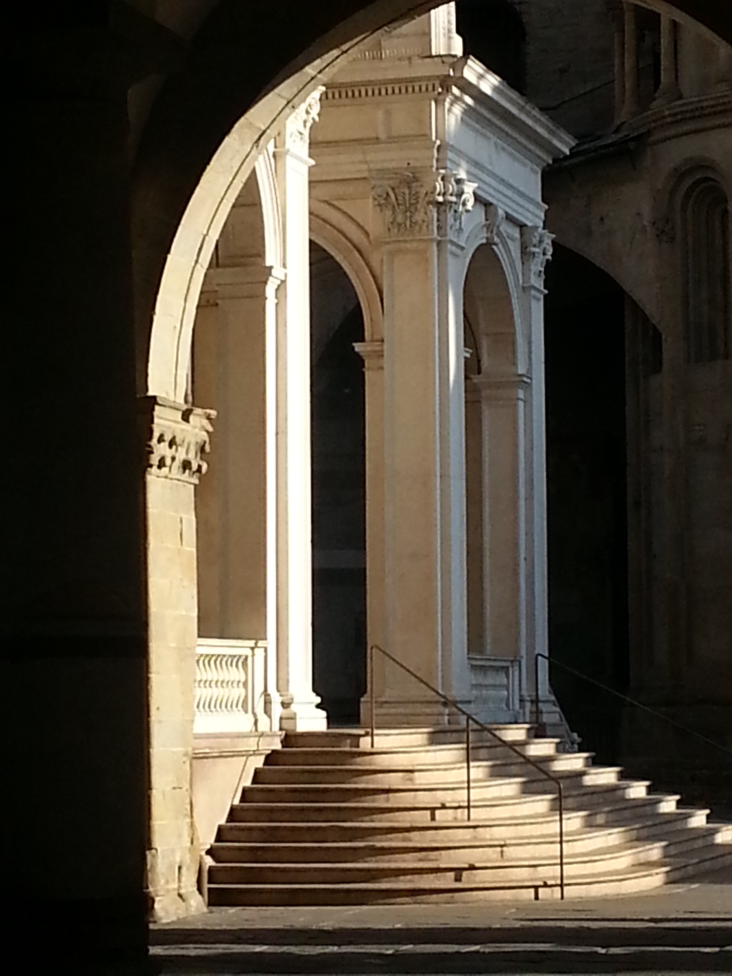 Scalinata d'accesso al duomo di Bergamo